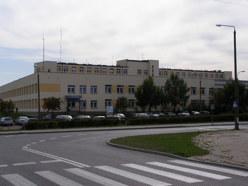 Grajewo – szpital powiatowy przy ul. Konstytucji 3 Maja.